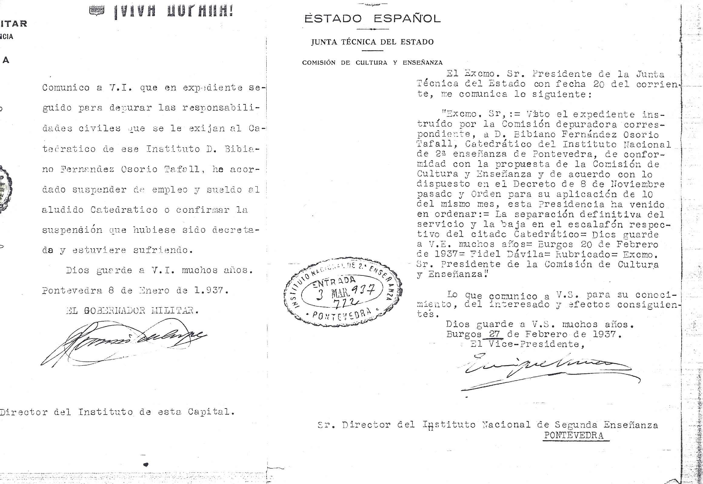 Suspensión de emprego e soldo, separación definitiva do corpo de Bibiano Fernández Osorio-Tafall